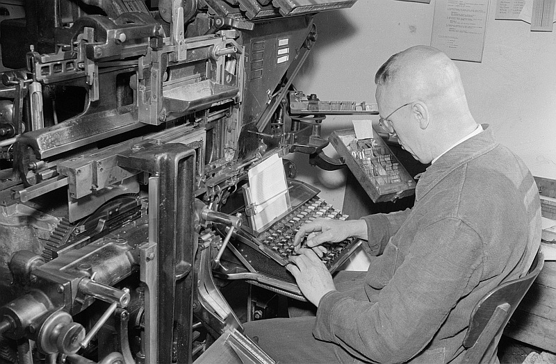 Original image description from the Deutsche Fotothek Schriftsetzer an einer Setzmaschine